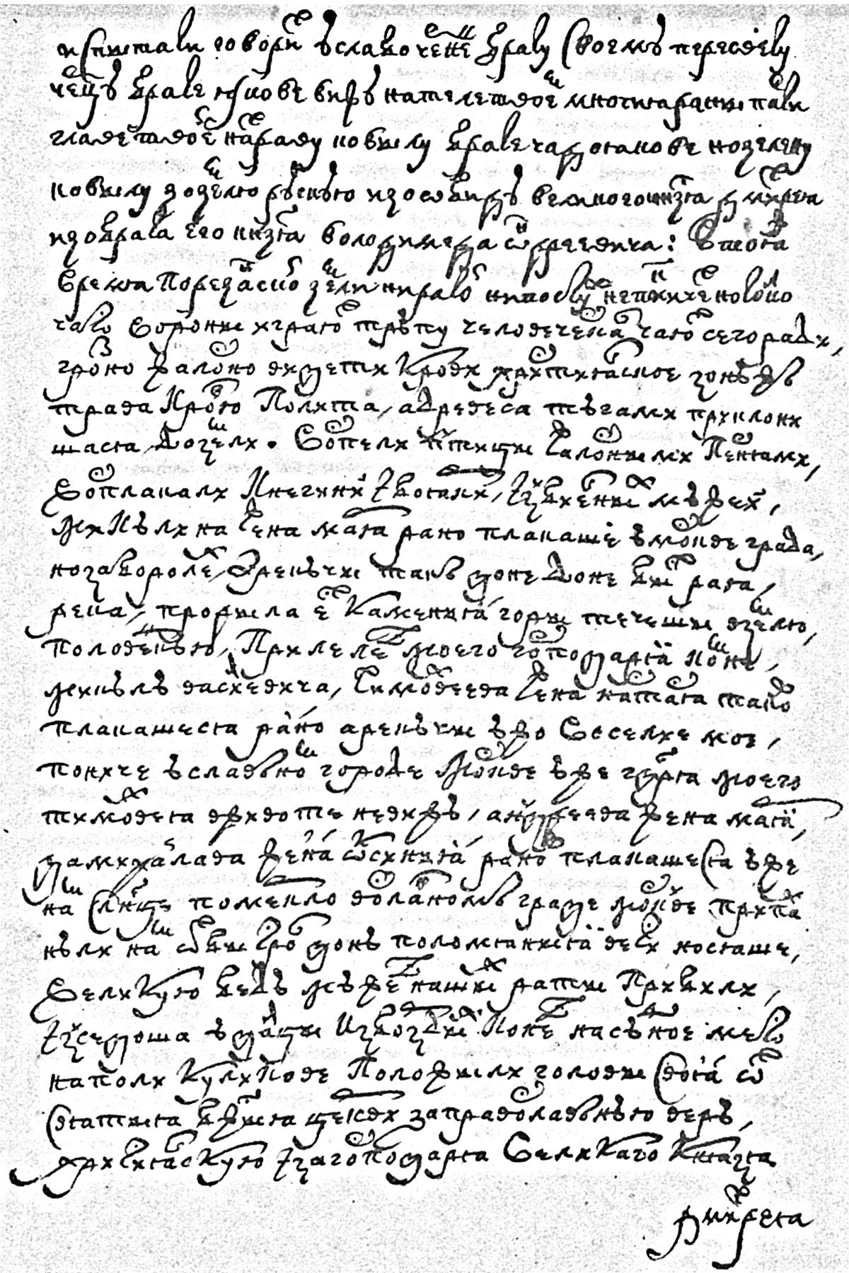 Л. 40 об. из "Задонщины" по списку ГИМ № 790 (из Синодального собрания). Воспроизводится по изданию Яна Фрчека (1948).